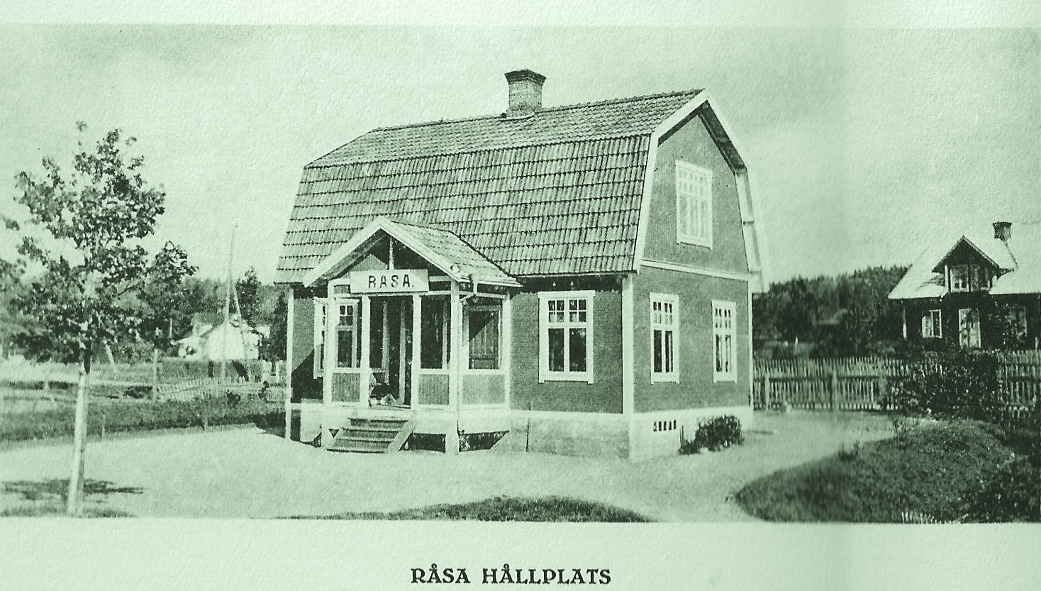 Foto på Silverdalens gamla järnvägsstation, kallad Råsa Hållplats